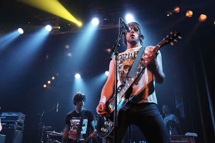 Strike Anywhere en la Sala Apolo, Barcelona, 2010. Fotos: Xavi Pedret. Puedes leer la crónica del concierto aqui!